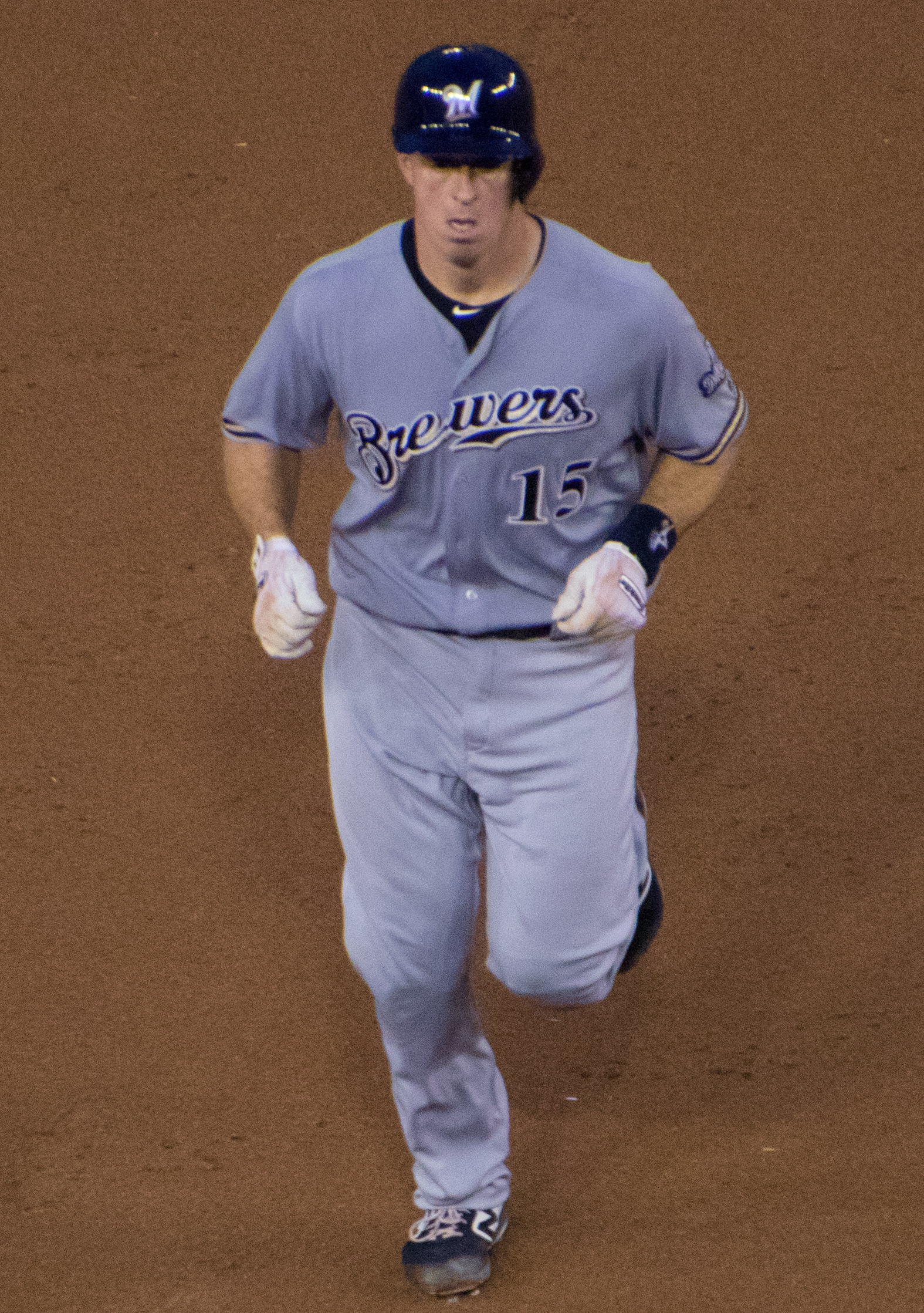 Erik Kratz